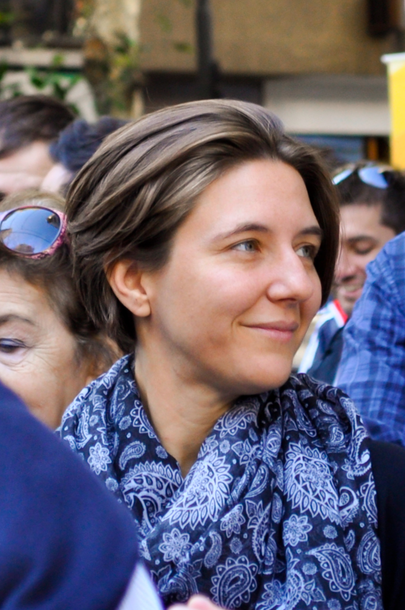 Fernanda Reyes en campaña de ECO en la Ciudad de Buenos Aires en 2015.